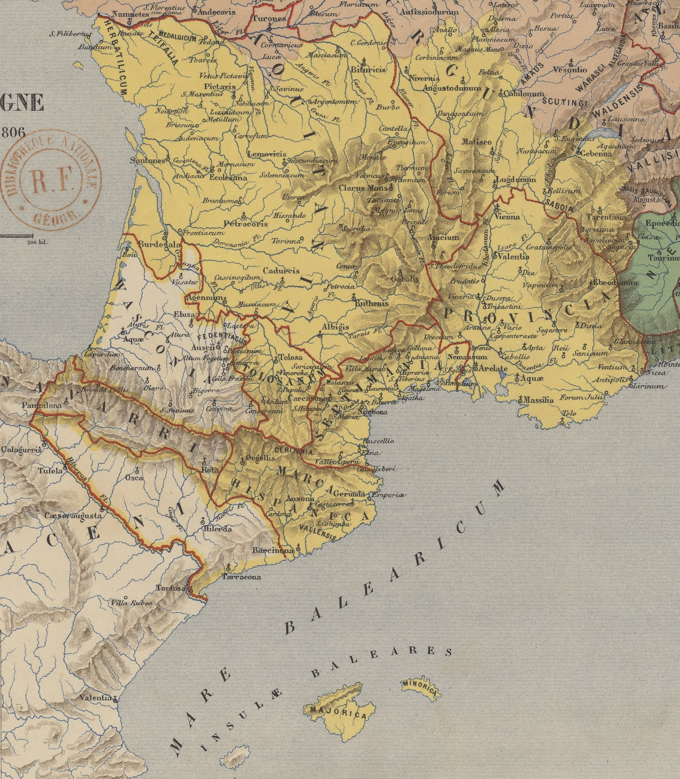 Mapa dau reiaume d'Aquitània en 806